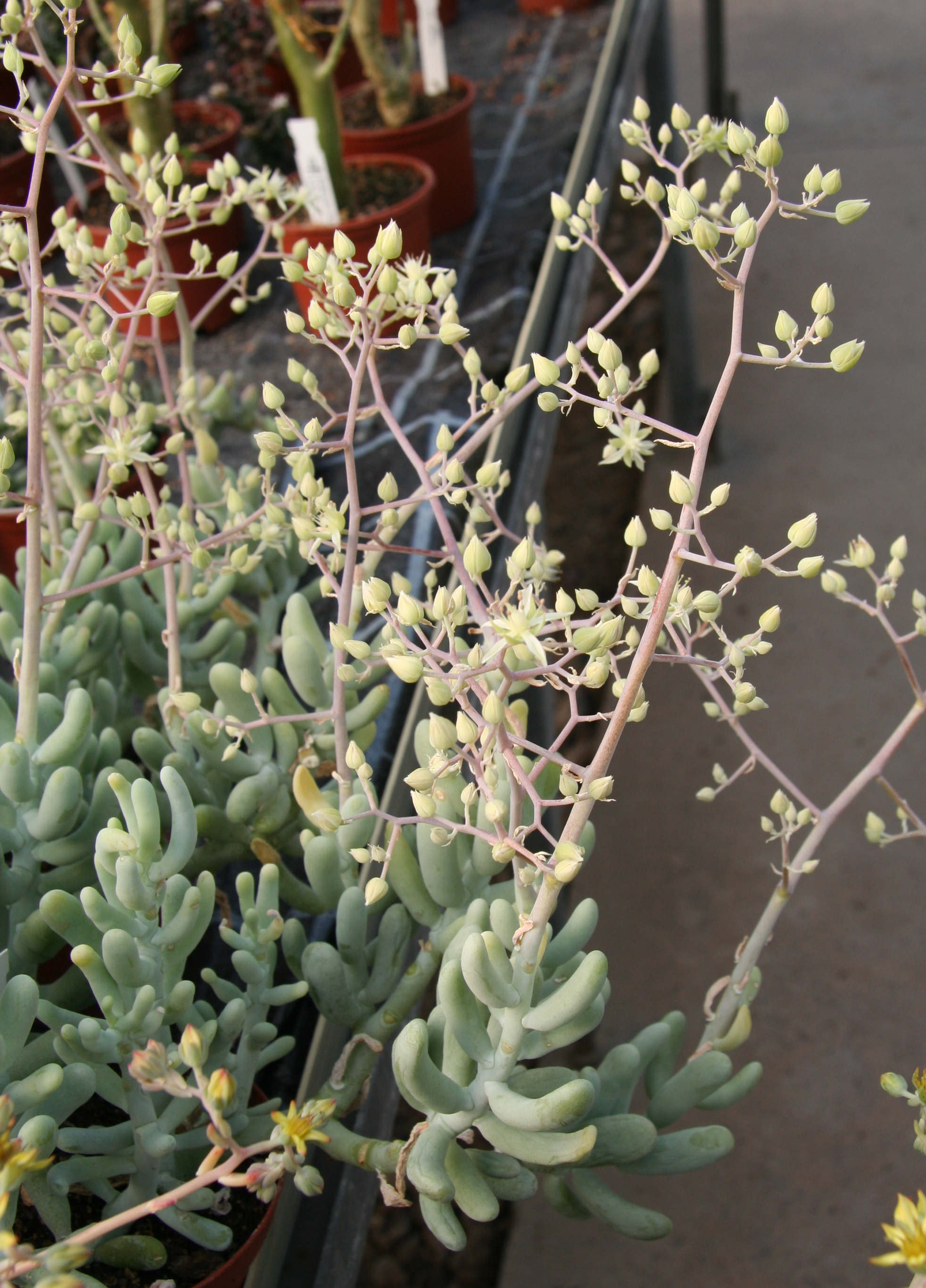 Sedum allantoides in Kultur bei Kakteen-Haage in Erfurt